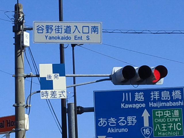 東京都八王子市の国道16号線に設置されている時差式信号機（後発）表示板と信号灯器